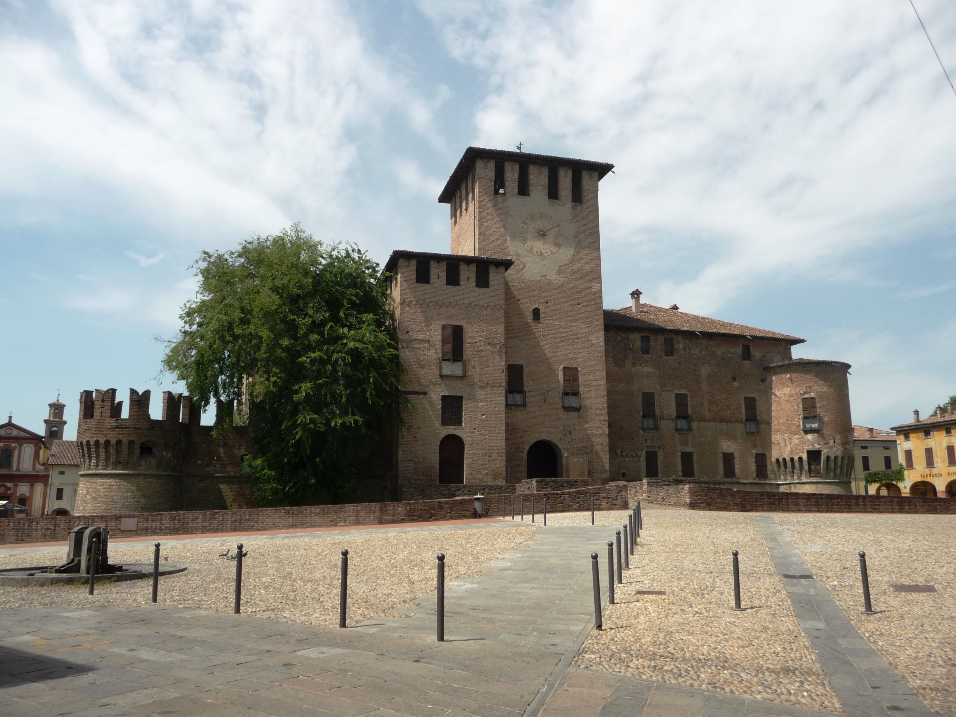 Rocca Sanvitale di Fontanellato - MIBAC This is a photo of a monument which is part of cultural heritage of Italy.